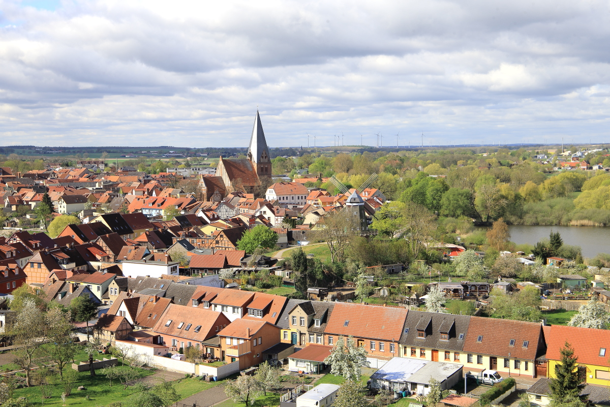 Röbel vom Turm der Marienkirche